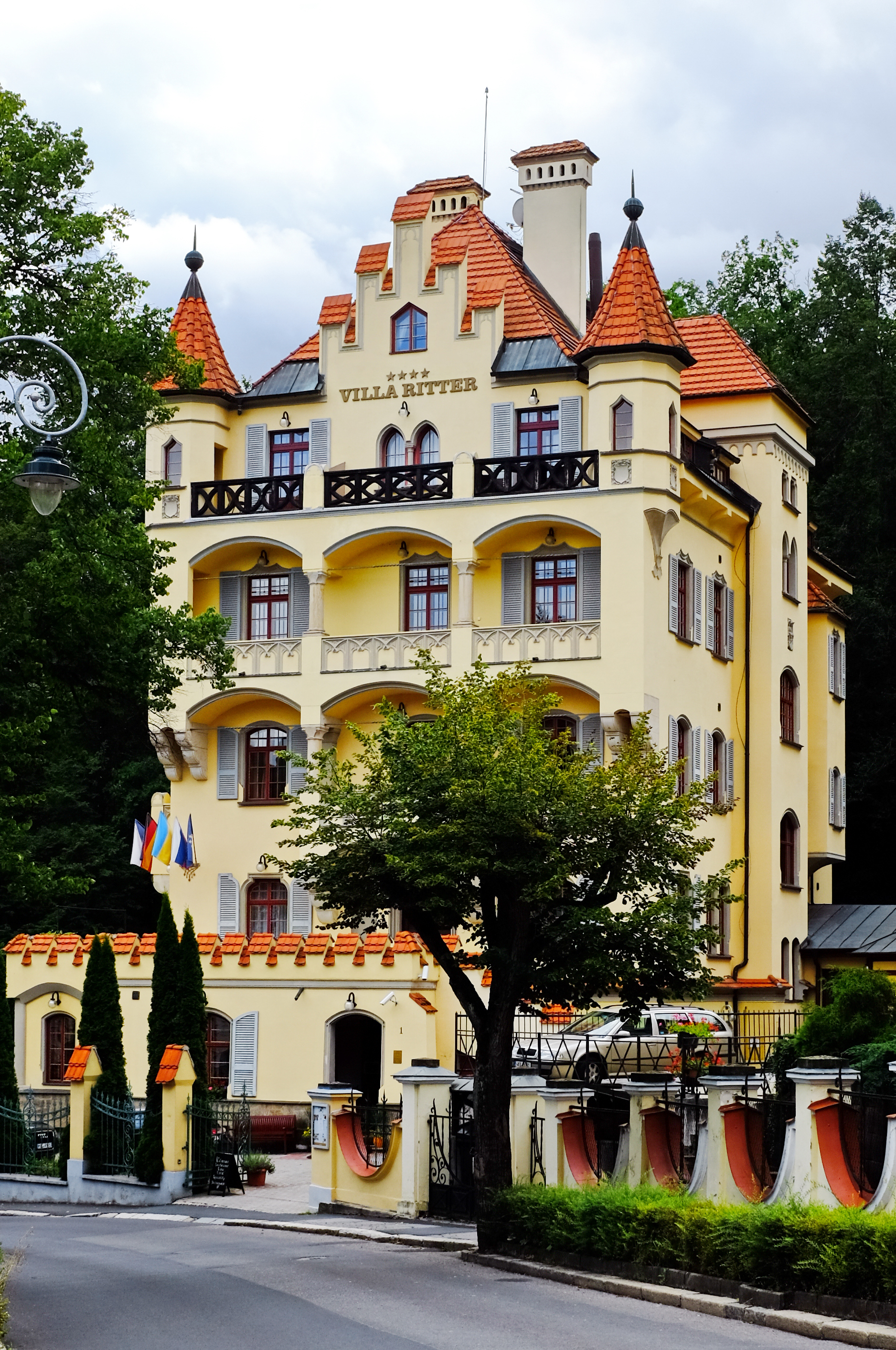 Lázeňský dům Brno, Krále Jiřího 991/1, Karlovy Vary.